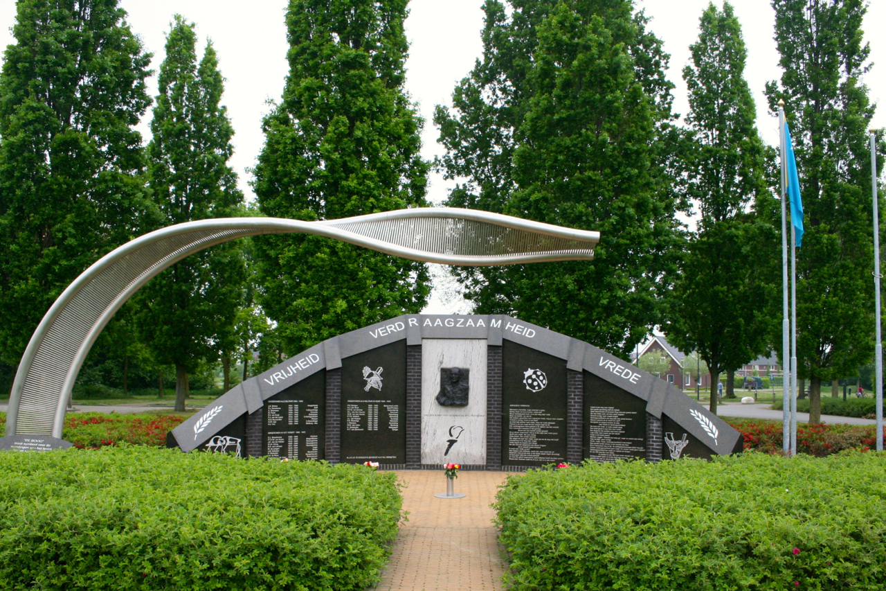 monument voor vrijheid verdraagzaamheid en vrede. monument ontworpen door Ger Van Iperen-Schenkels. foto dvhout